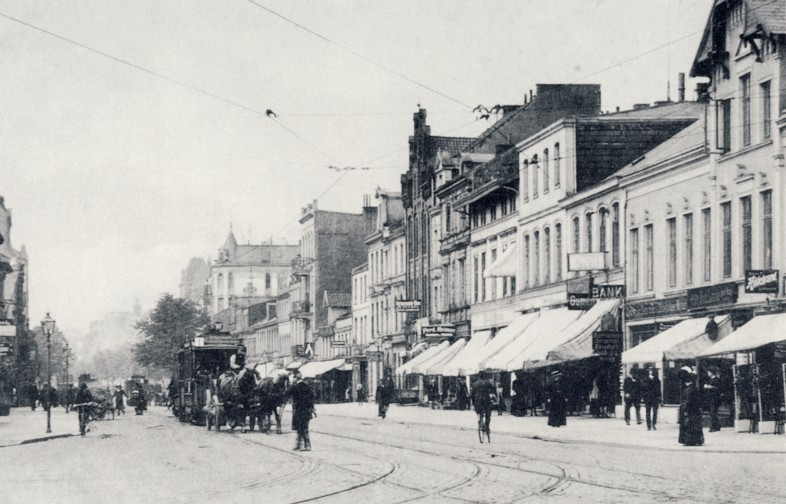 Wandsbeker Marktstraße (damalige Hamburger Straße) in Hamburg-Wandsbek gesehen in Richtung Westen um 1880.